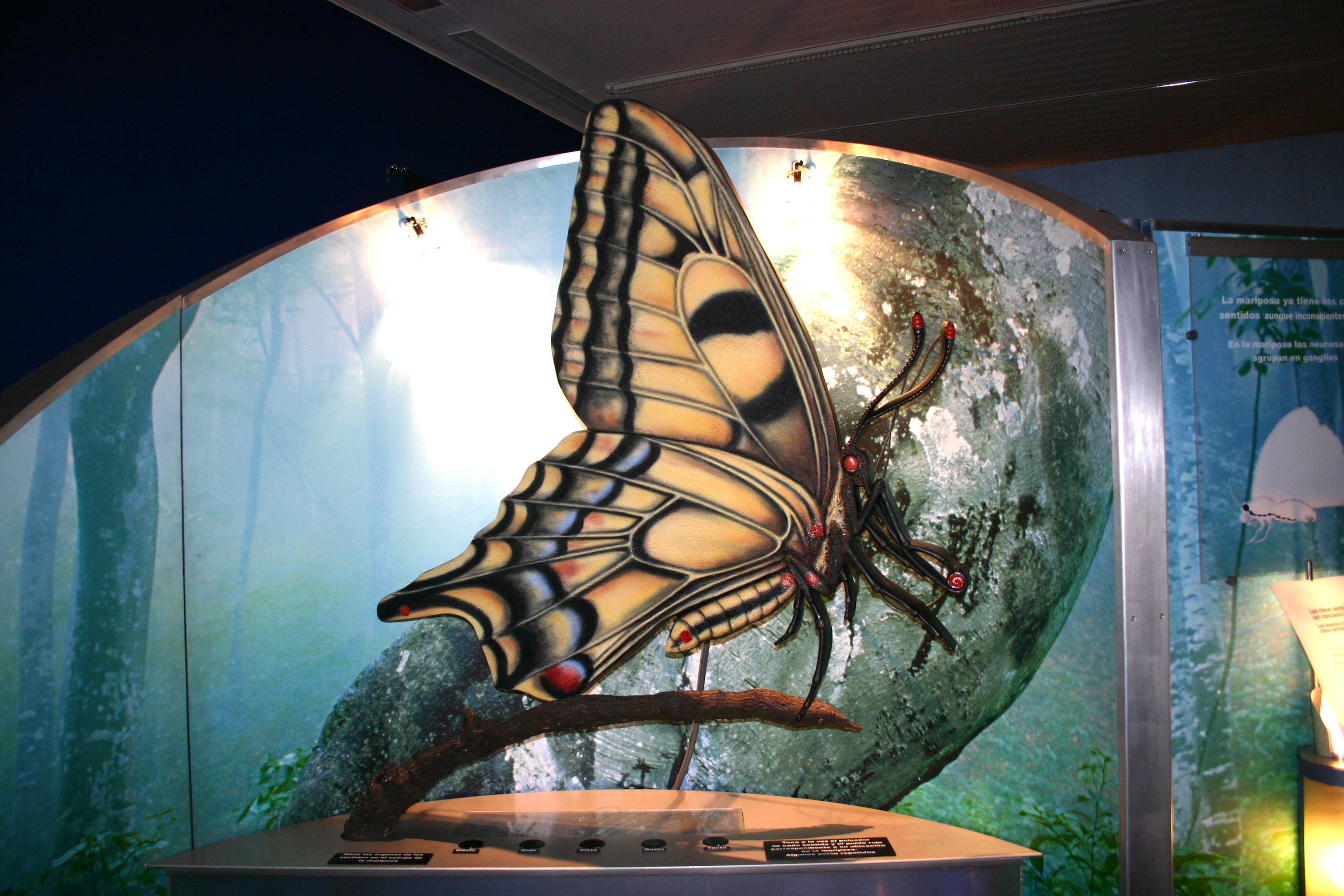 Uno de los módulos de la Sala de la Neurona del Museo de la Ciencia de Valladolid